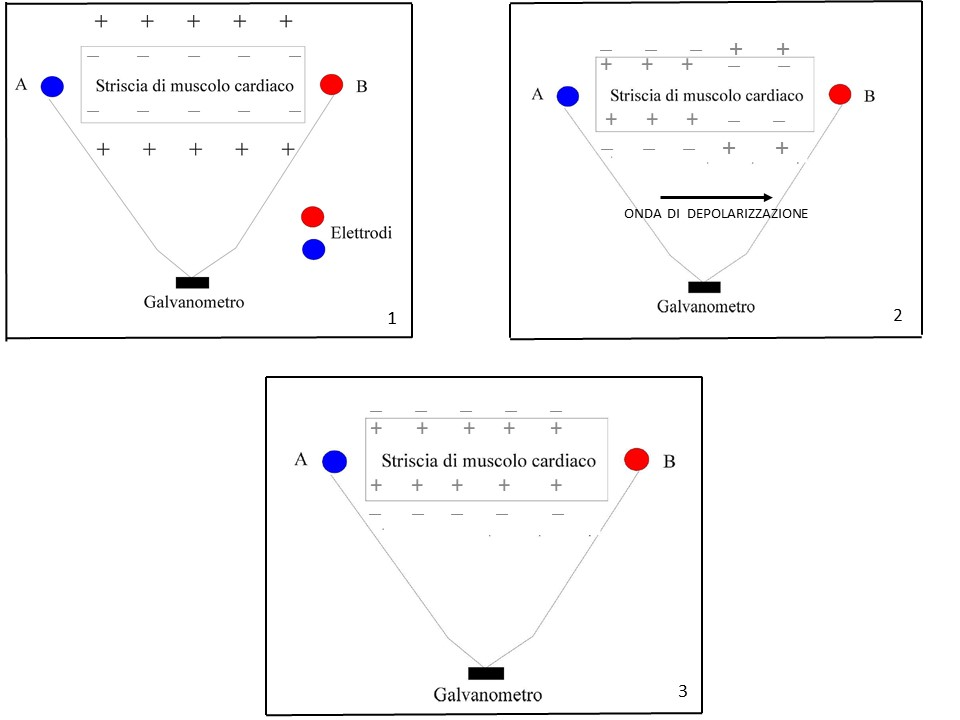 Depolarizzazione di una cellula muscolare, 1 Stato di riposo. 2 Inizio depolarizzazione. 3 Fine depolarizzazione.